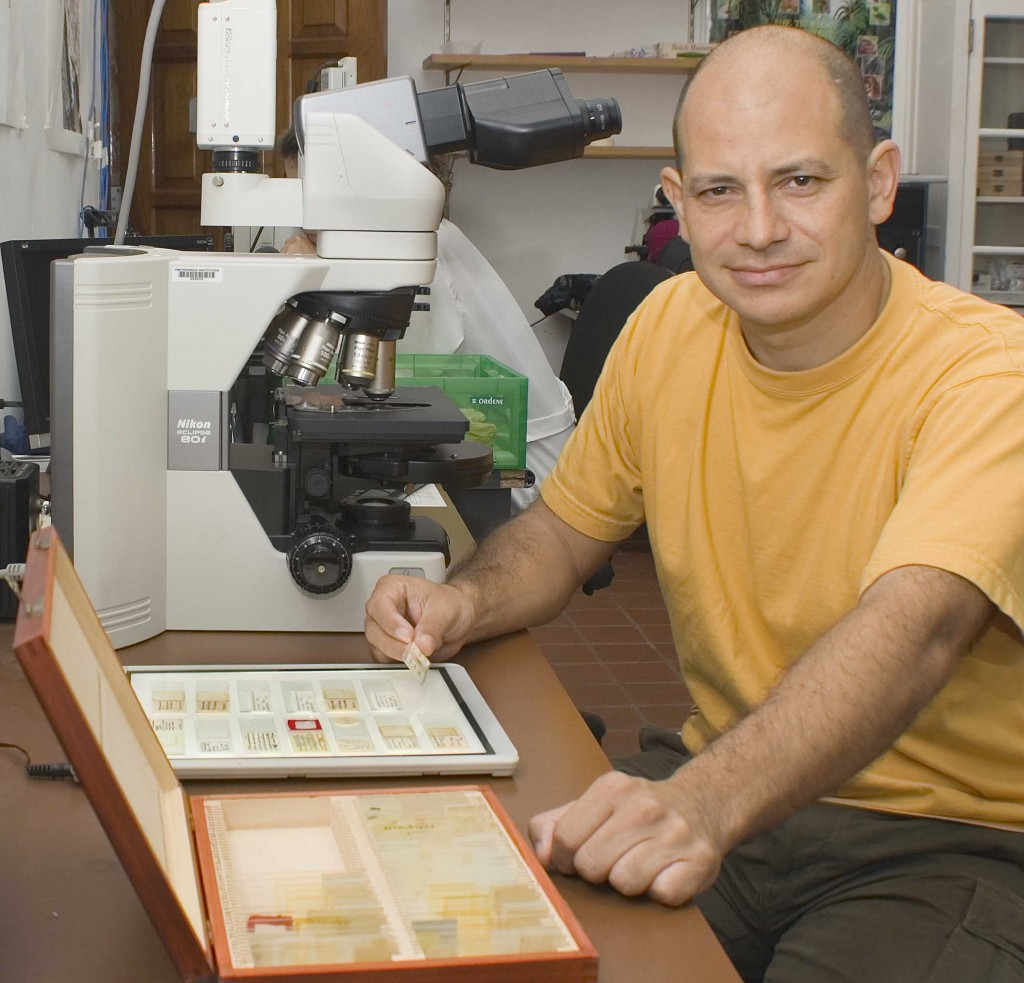 Photo: Carlos Jaramillo uses a microscope to study pollen from the Graham collection (Photo by Marcos Guerra).